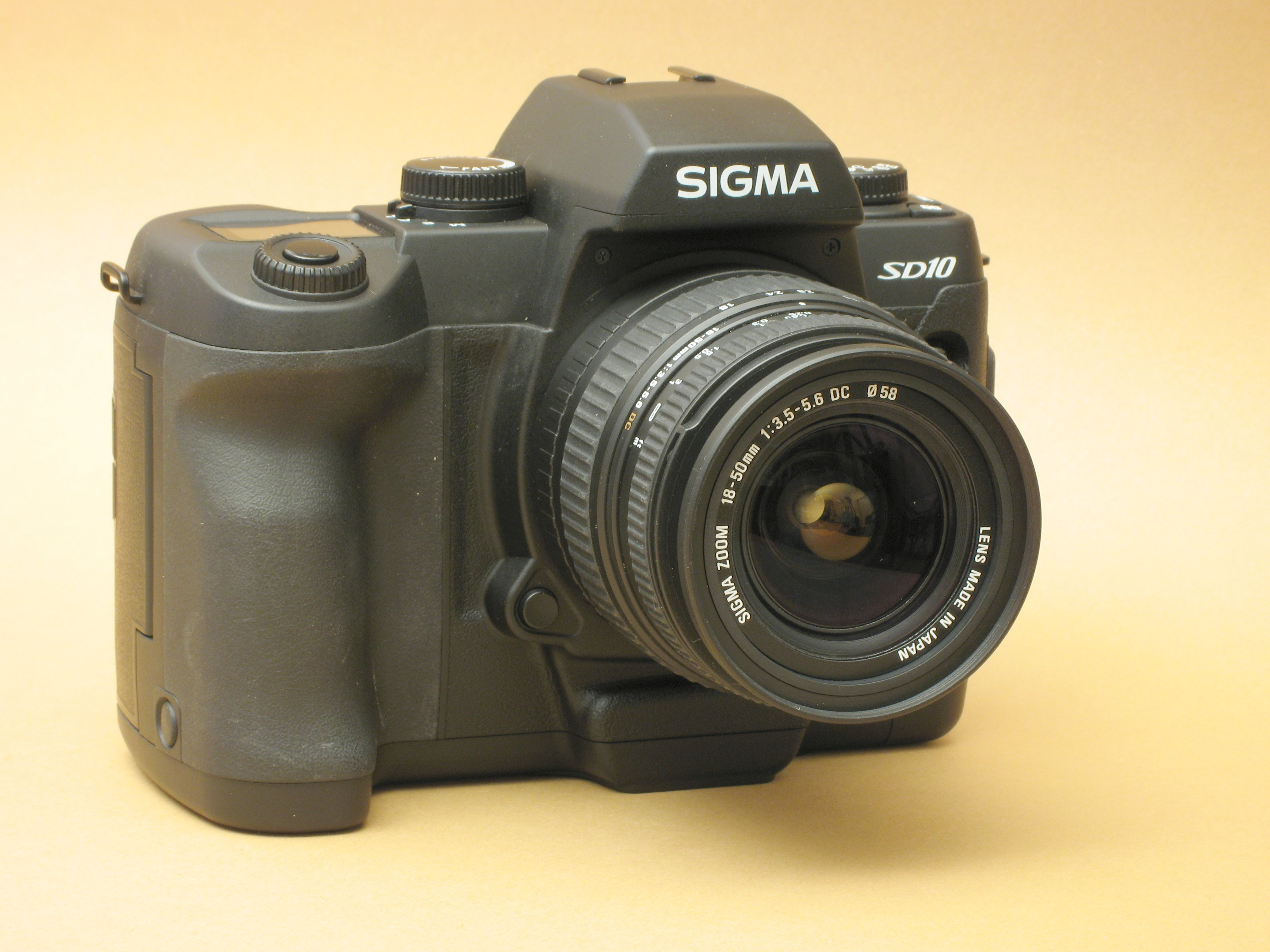 Digital SLR-camera Sigma SD10, lense Sigma Zoom 18-35mm / 1:3.5-5.6